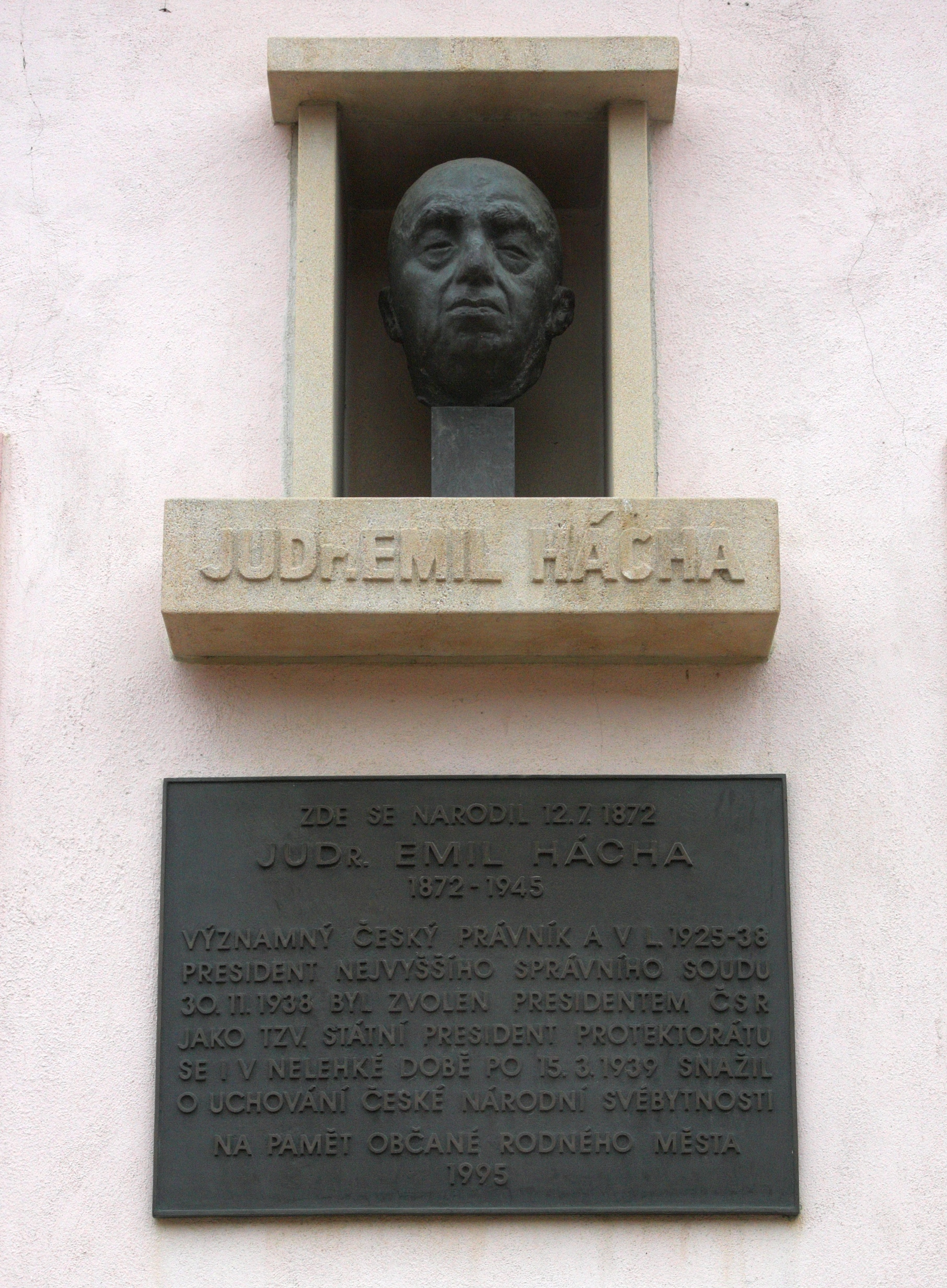 Trhové Sviny - busta a pamětní deska na rodném domě Emila Háchy, Nové město 228.